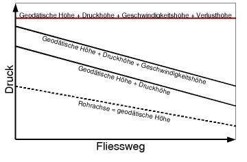 Druck und Energiehöhe in einer Rohrleitung / schematisch